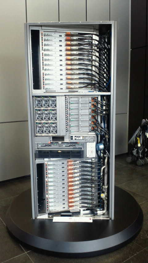 京コンピューターの一つ。大きさは大型の家庭用冷蔵庫ぐらい。